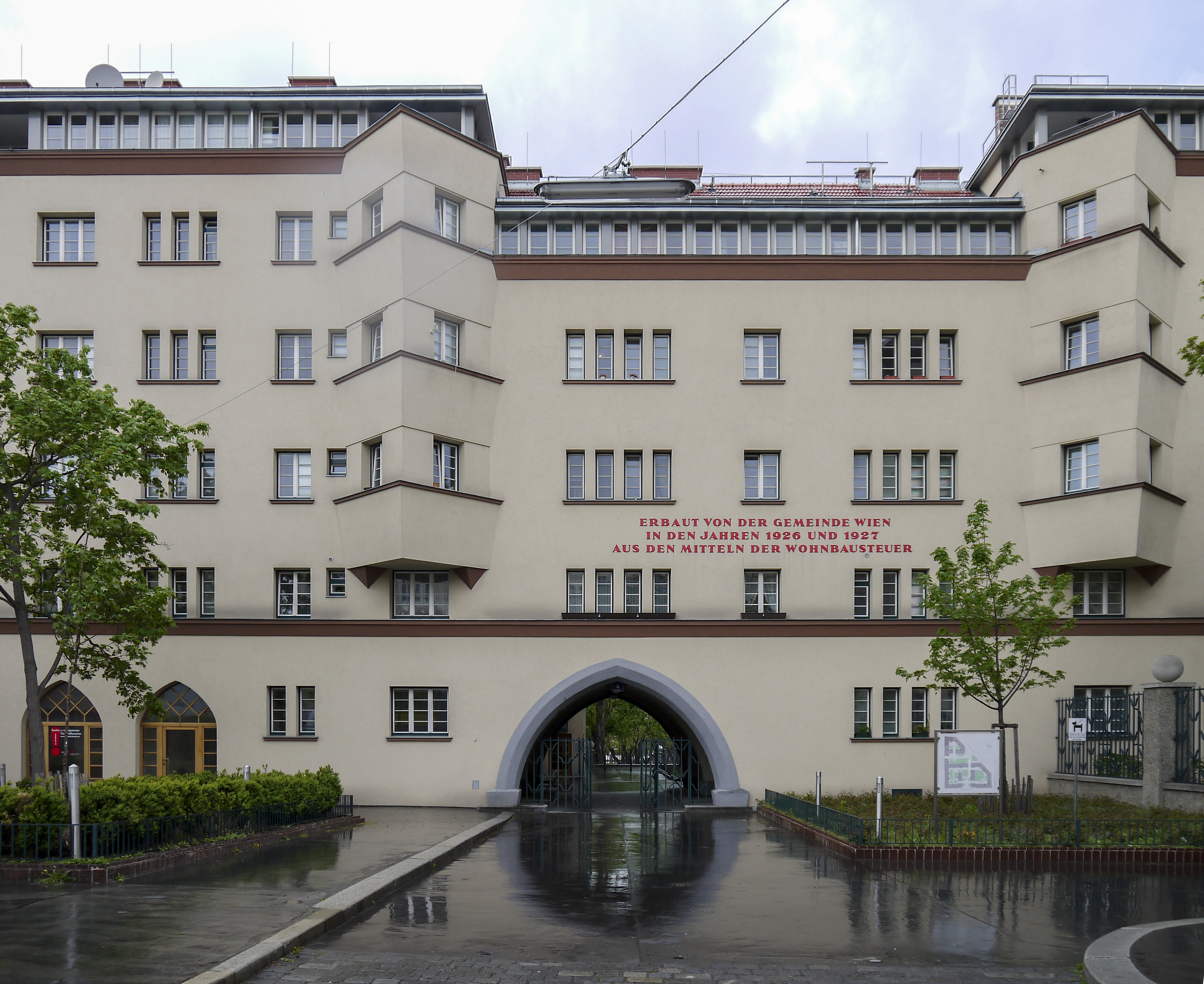 Kommunaler Wohnbau, Liebknechthof